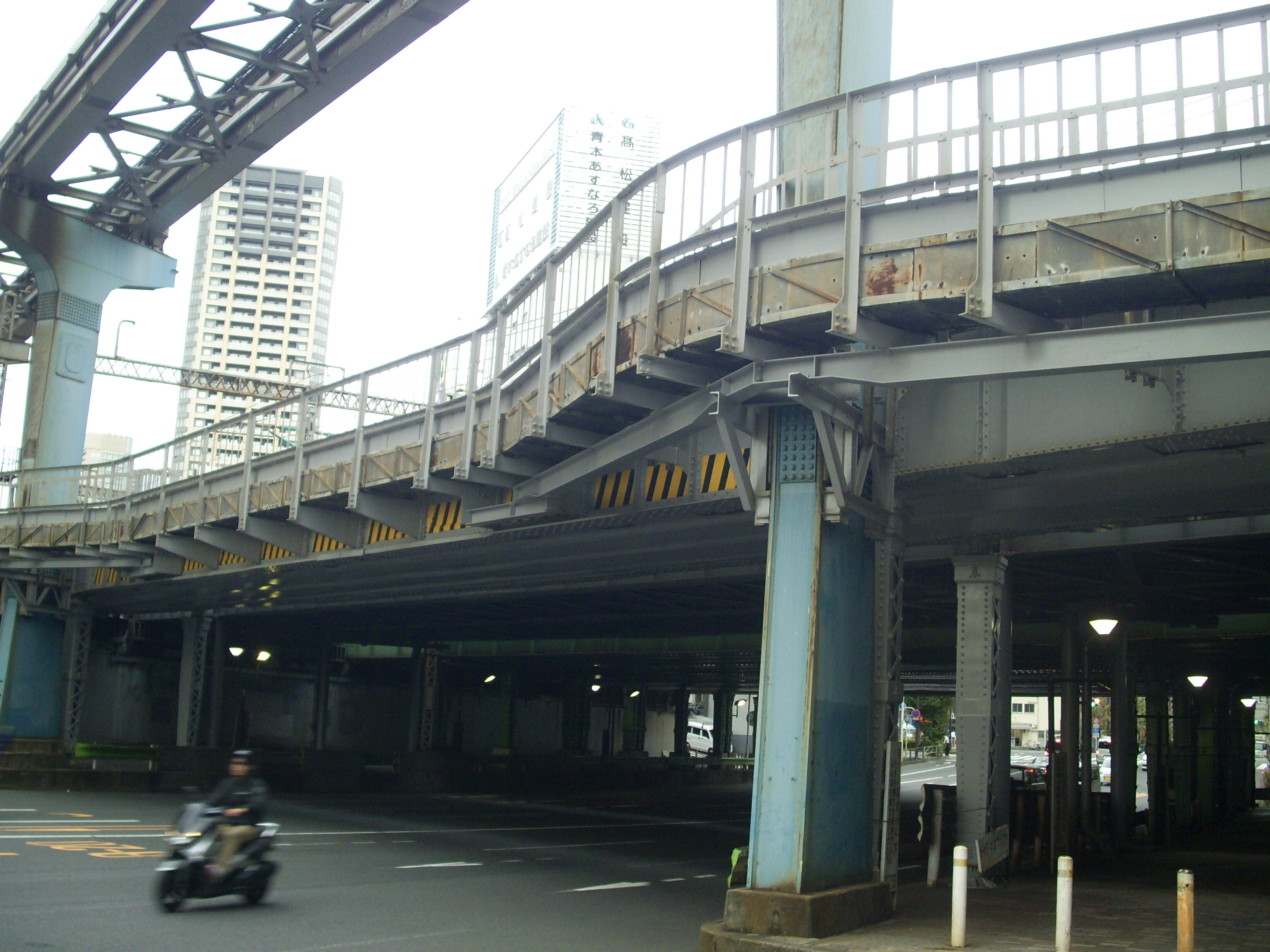 東海道貨物線の金杉橋梁。国道130号（旧海岸通り）を跨いでいるが、ここは以前は芝浦運河に注ぐ古川（渋谷川）支流であったことから河川橋梁として整備されたもので、架道橋扱いされていない。 ㊟カメラを起動すると日付機能が出荷時のものに初期化されるため、ファイル履歴の投稿日時とメタデータの原画像データの生成日時が異なります（本概要欄の下記日付が撮影日）